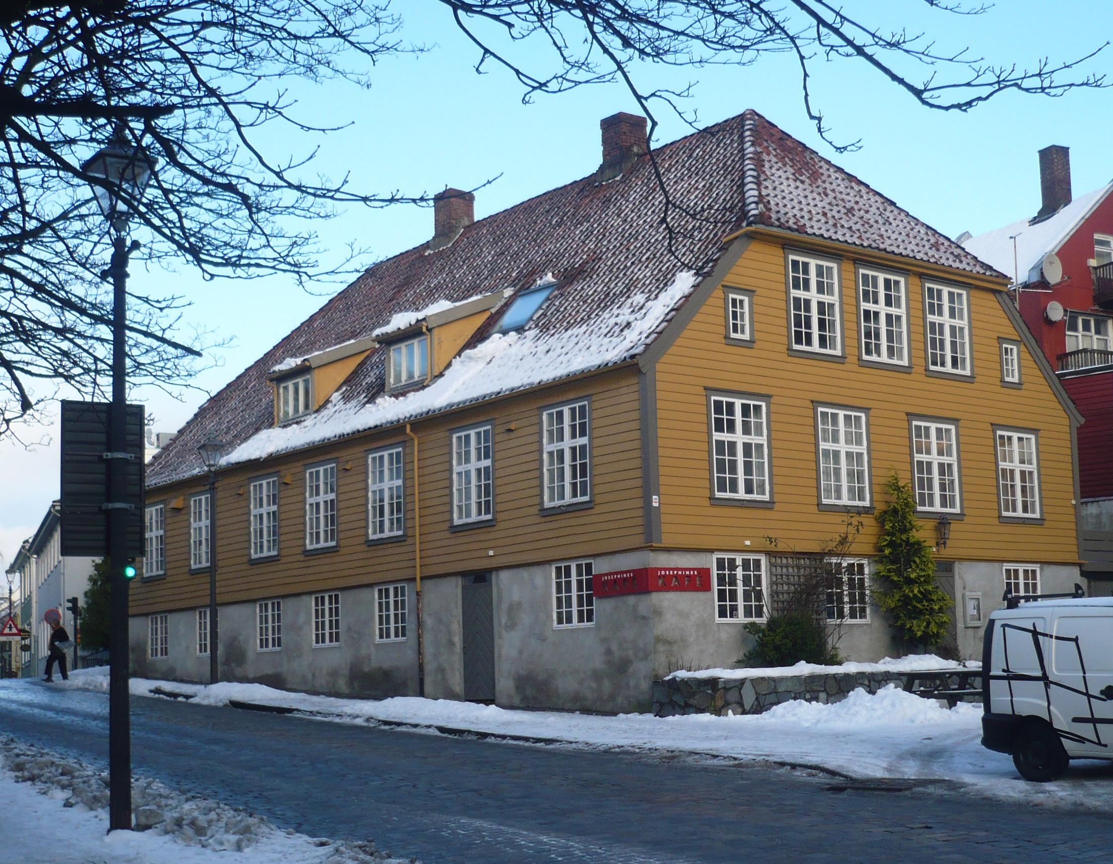 Huset til Josefinestifelsen i krysset Kongsgata og Stiftelsesgata i Stavanger